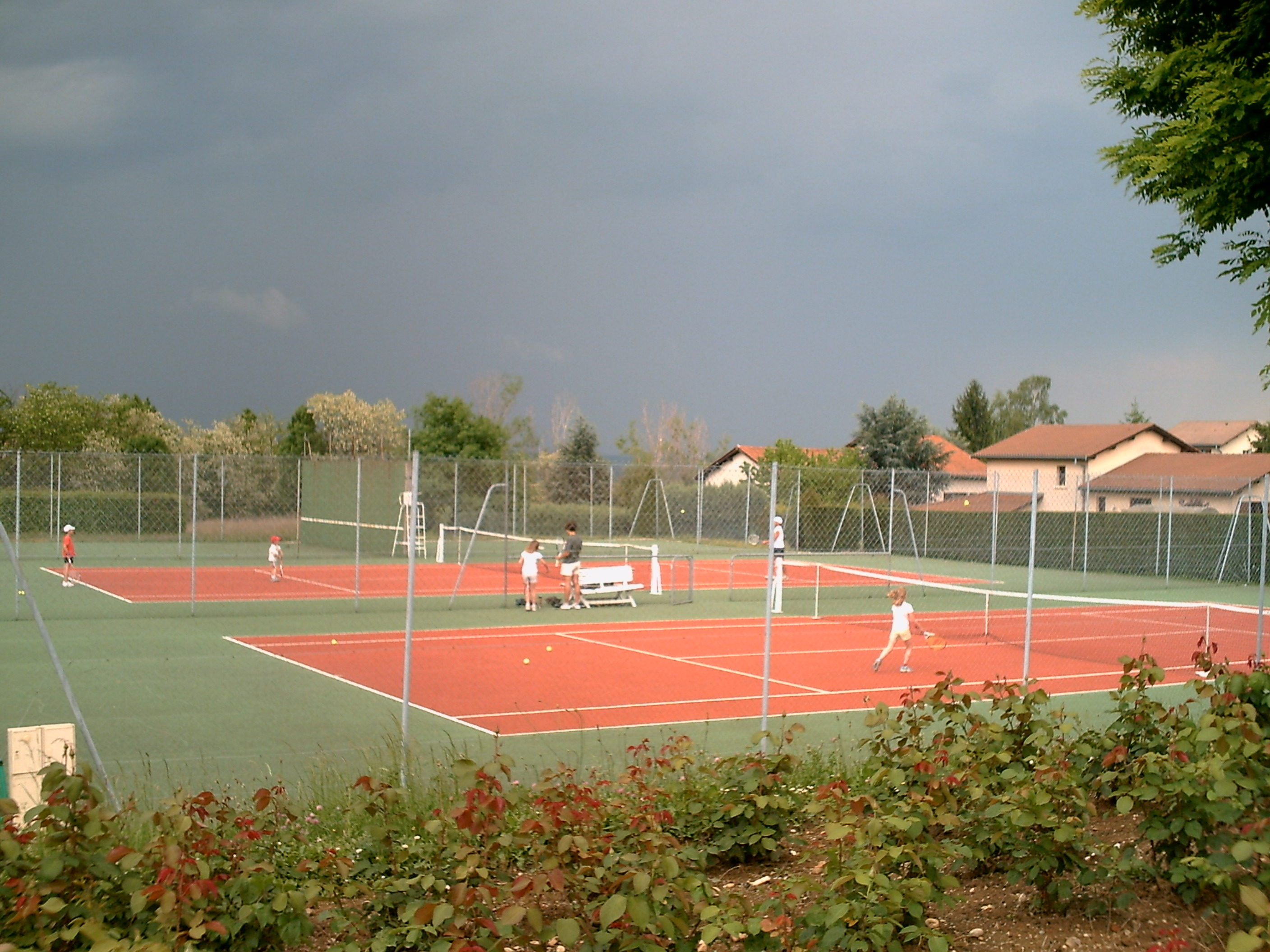 Serpaize (Isère, France)